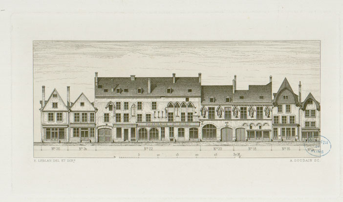 La façade de la Rue du Tambour, N° 14 à 26, plan d'élévationse trouvant à la BM de Reims sous la référence : XLIII_tam_a01_BMR028_309_B514546101_.